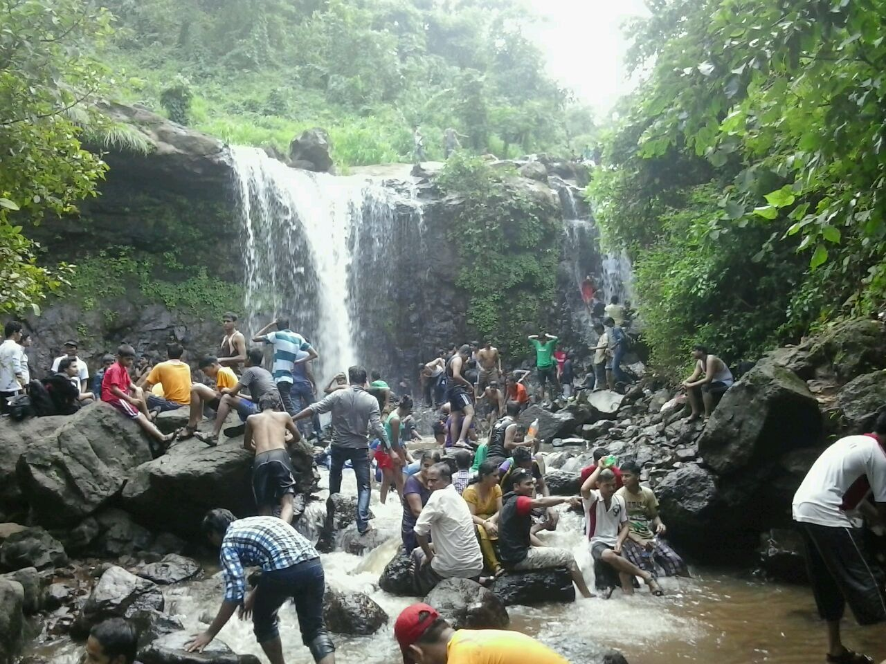 A waterfall at Palasdari.